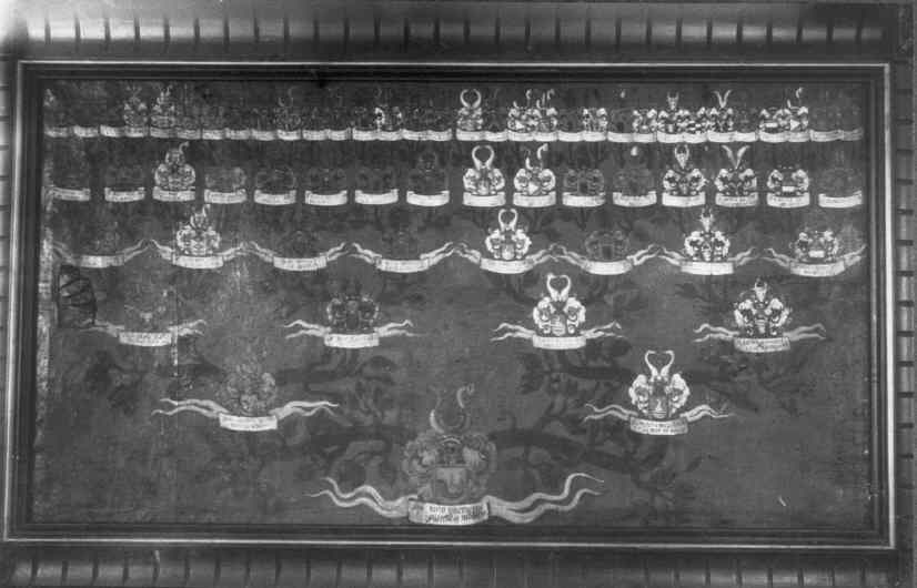 Anträd över fru Karin Gyllenhorn, oljemålning på duk. Kategori: (09) VapenAnträd över fru Karin Gyllenhorn, oljemålning på duk.